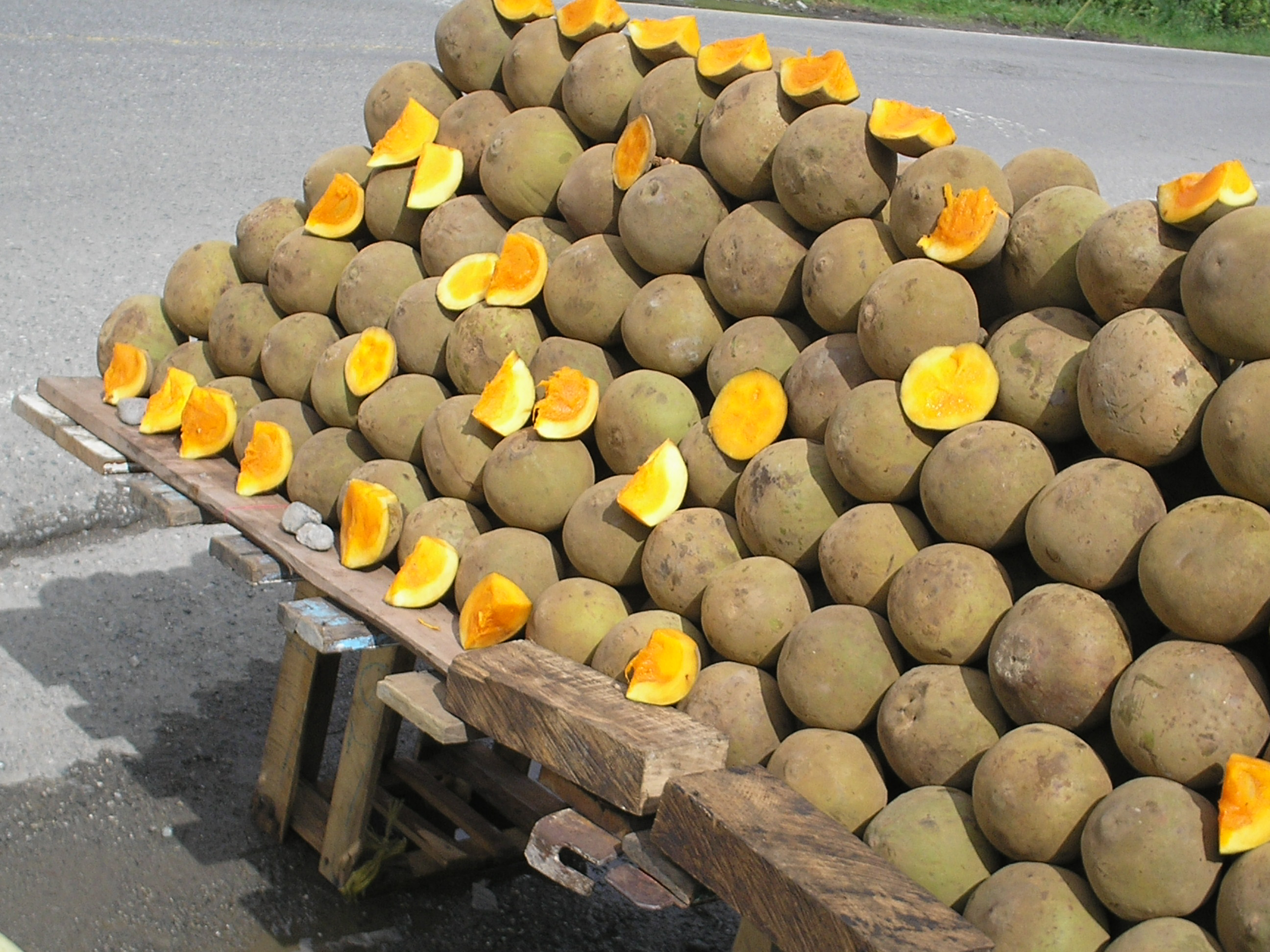 Quararibea cordata (zapotes) amontonados para su venta.